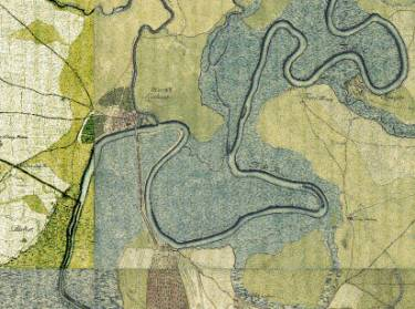 Szolnok és Szandaszőlős az első katonai felmérés idején, 1782